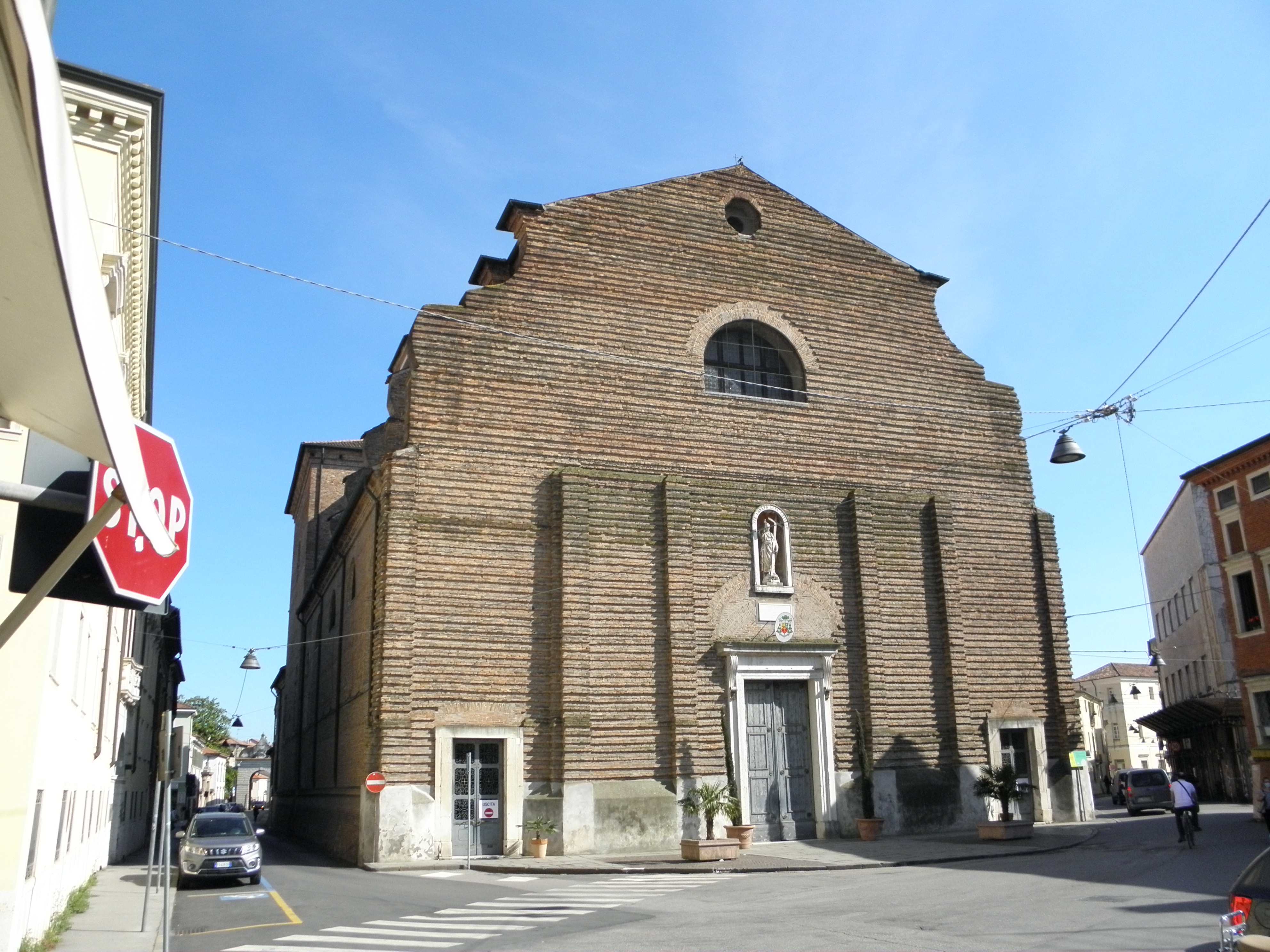 Rovigo, il Duomo o Basilica Concattedrale di Santo Stefano Papa e Martire.